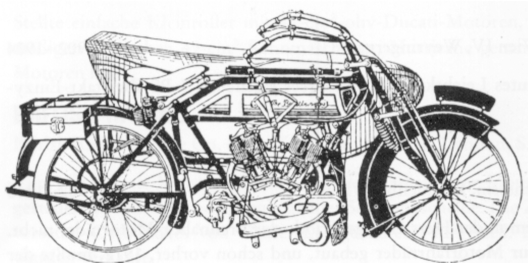 Prent van Bradbury 790 cc.